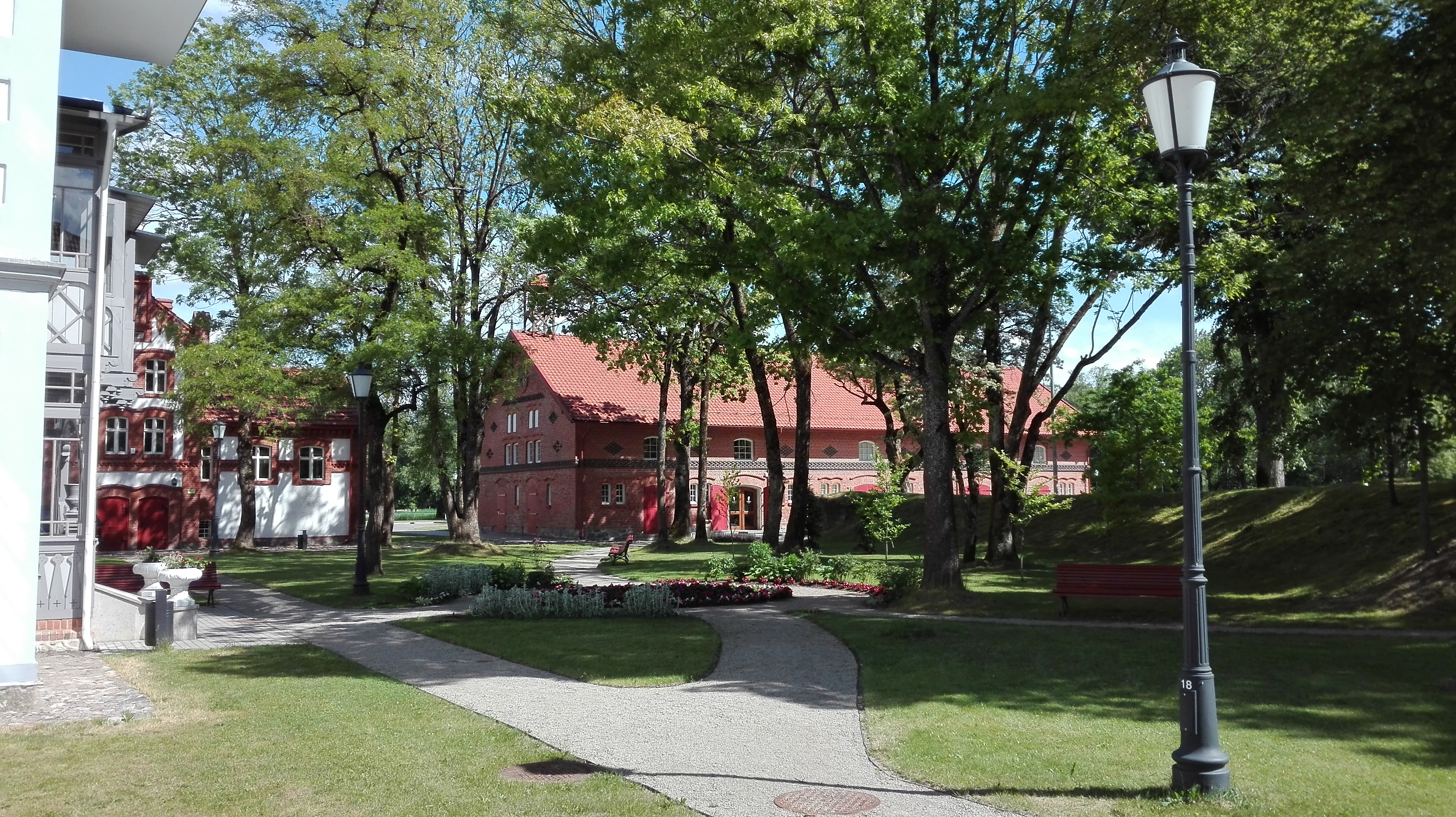 Šojaus dvaro vidinis kiemas